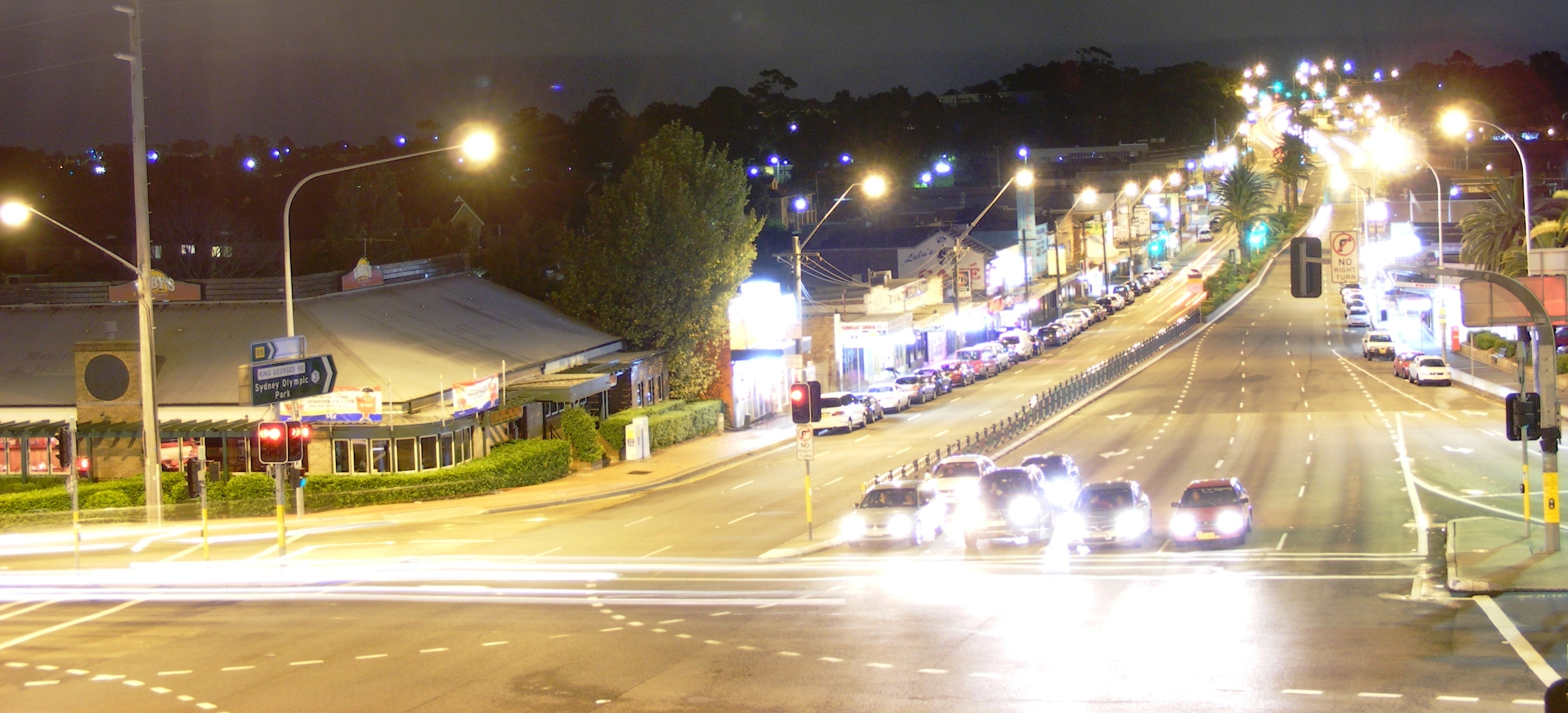 MAIN ROAD BEVERLY HILLS